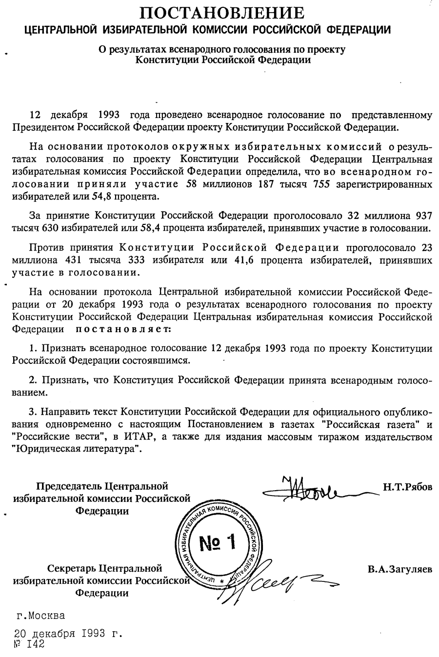 Постановление Центральной избирательной комиссии Российской Федерации от 20 декабря 1993 года № 142 «О результатах всенародного голосования по проекту Конституции Российской Федерации».